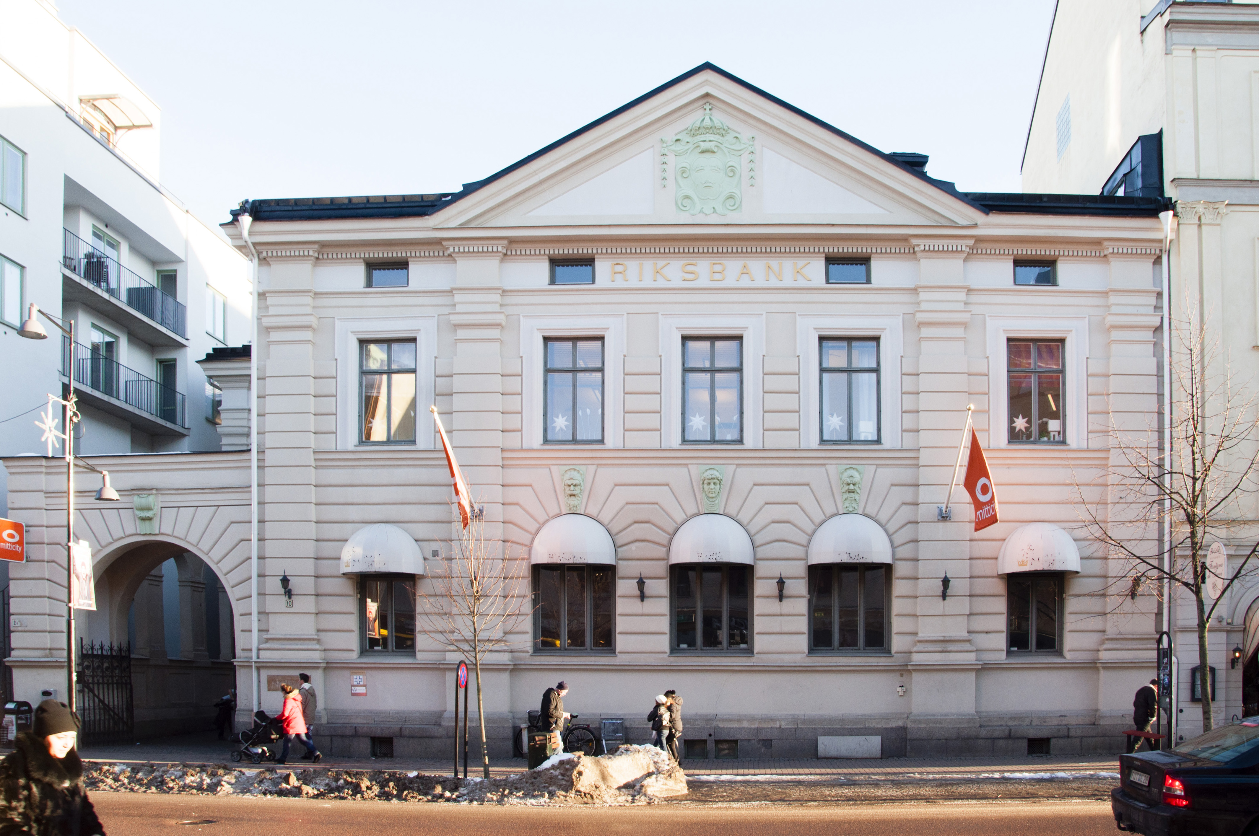 Gamla Riksbankshuset, Karlstad. Byggnadsår 1898-99. Arkitekt Aron Johansson